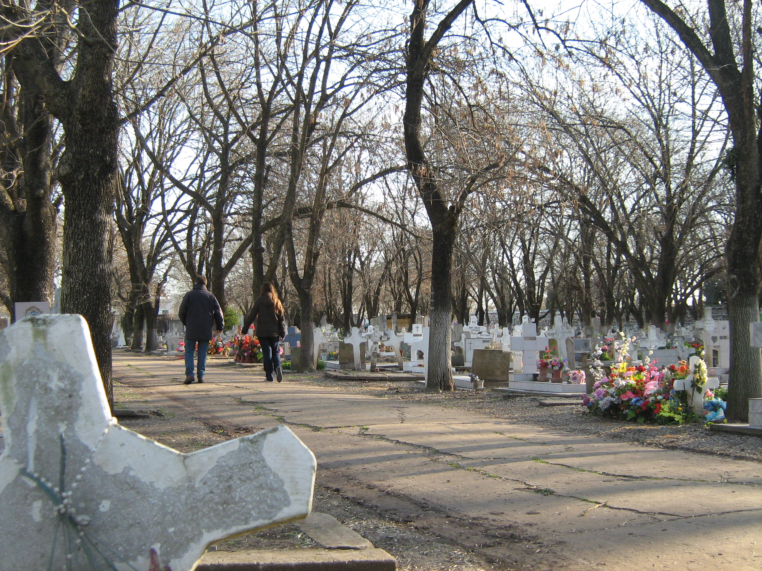 Foto tomada en el Cementerio de la Ciudad de La Plata